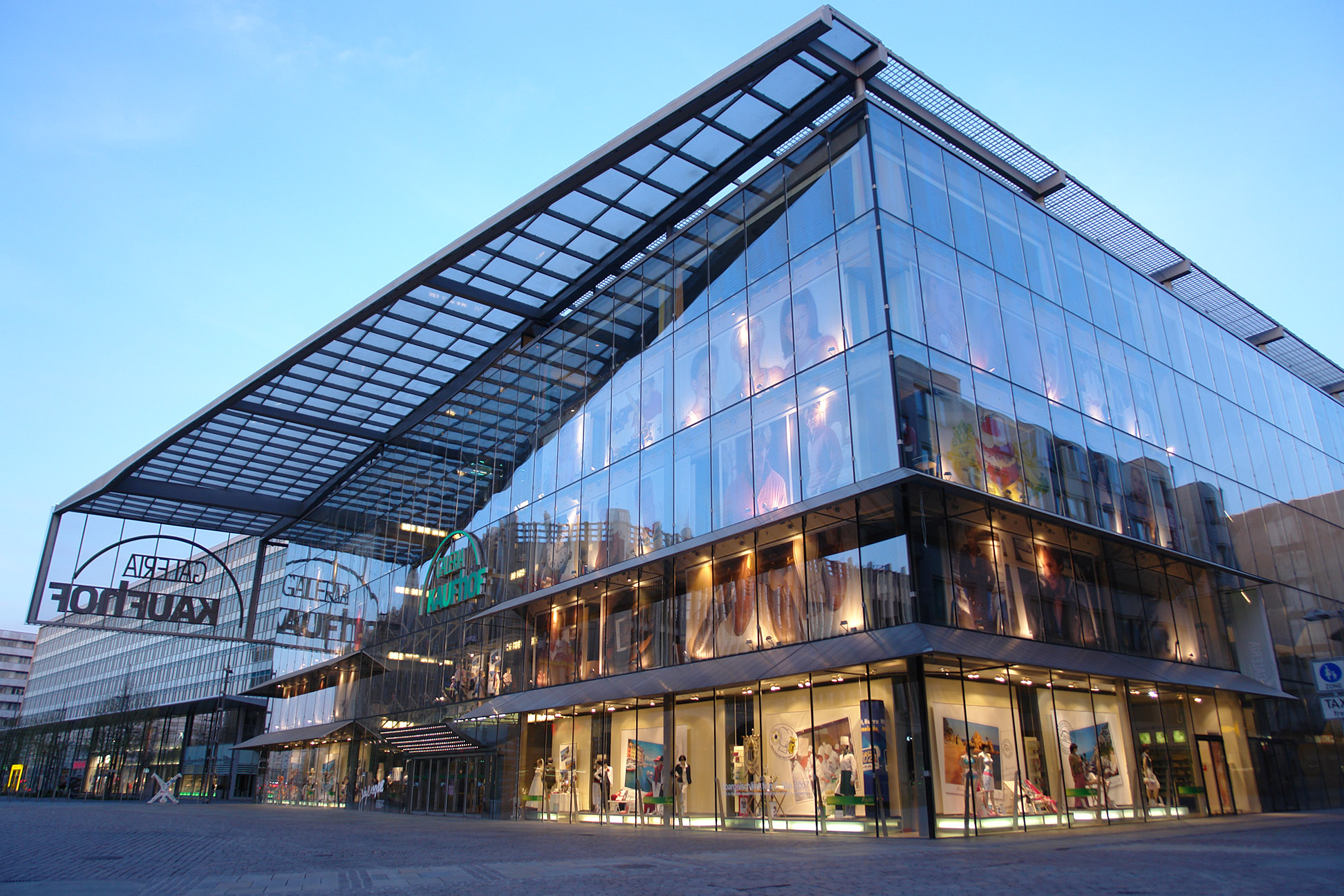 Das gläserne Kaufhaus ;Chemnitz Germany